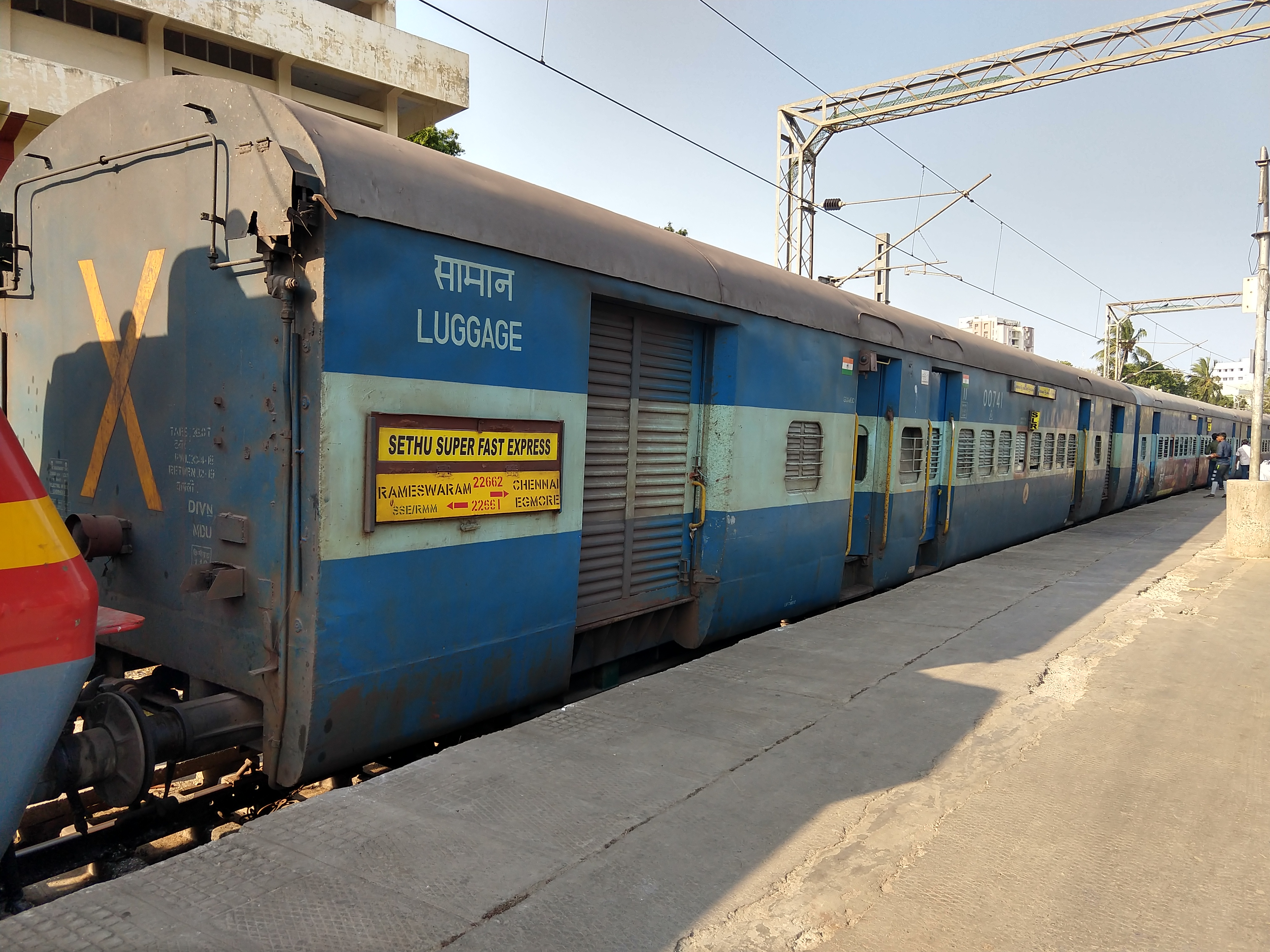 Sethu SF Exp halted in Platform 8th at Chennai Egmore.